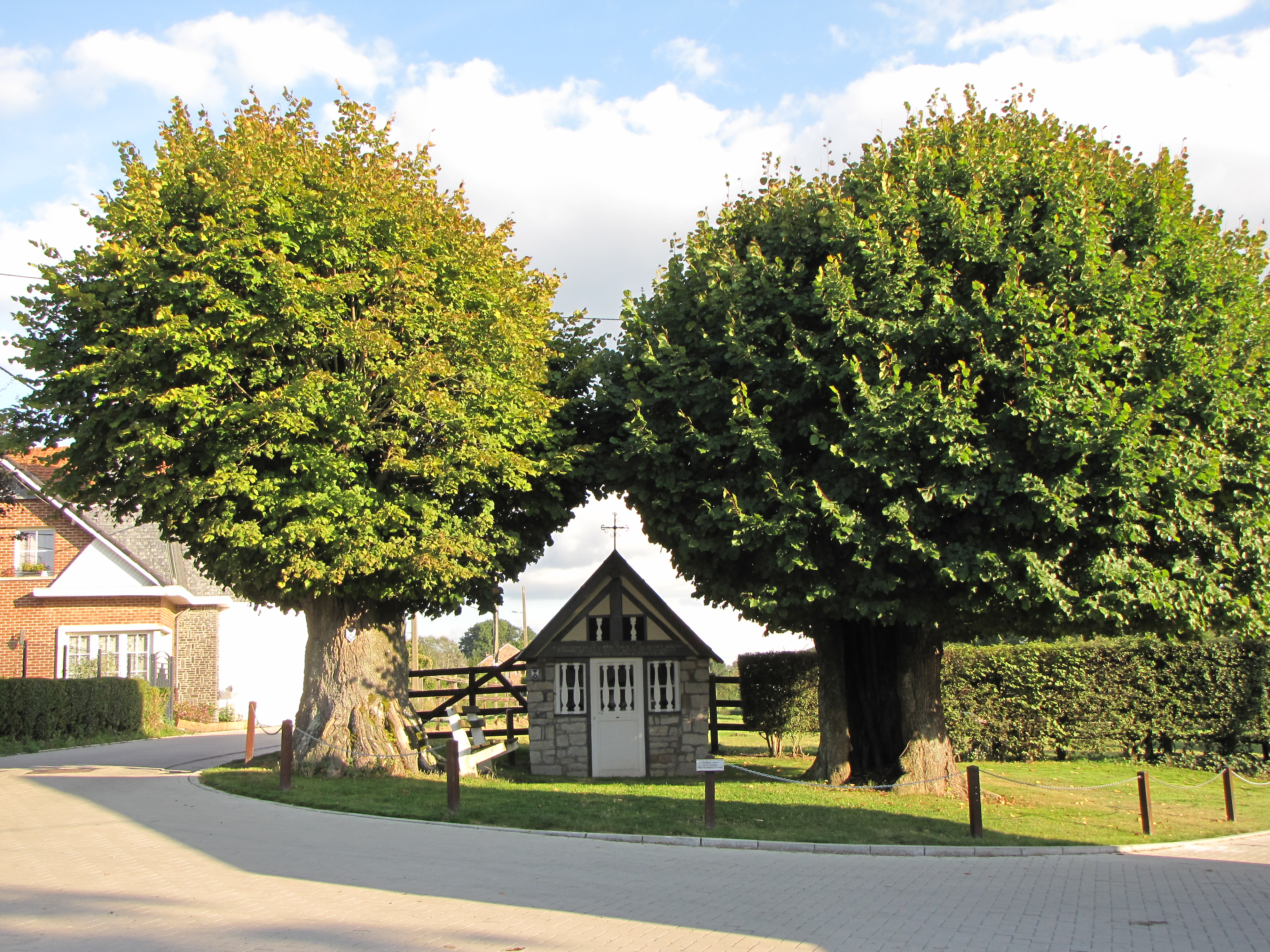 La chapelle Notre-Dame de Bon Secours du Trôleu (M) ainsi que l'ensemble formé par ladite chapelle, le terrain avoisinant et les deux tilleuls qui l'ombragent (S) à Louveigné